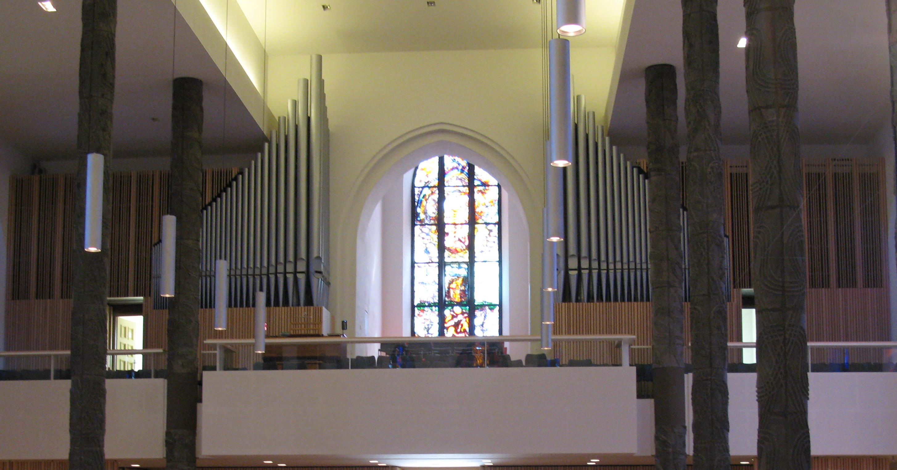 Walcker Orgel der Matthäuskirche Mannheim